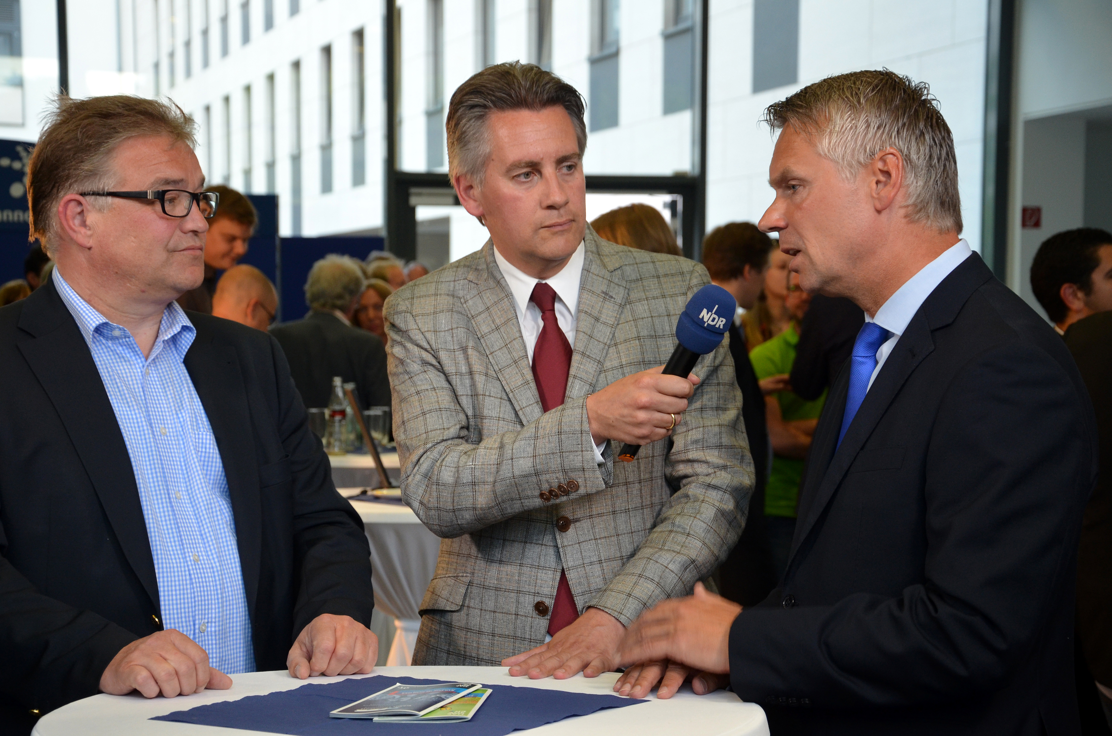 Wenige Minuten nach der Auszählung der Stimmen für die Wahl des Regionspräsidenten der Region Hannover traten der Amtsinhaber Hauke Jagau (links) und der ehemalige Polizeipräsident und Herausforderer Axel Brockmann (rechts) im Haus der Region Hannover vor die Kamera des NDR, hier in der Moderation durch Christoph Hamann (Mitte, mit Mikrofon) für die Sendung Hallo Niedersachsen ...